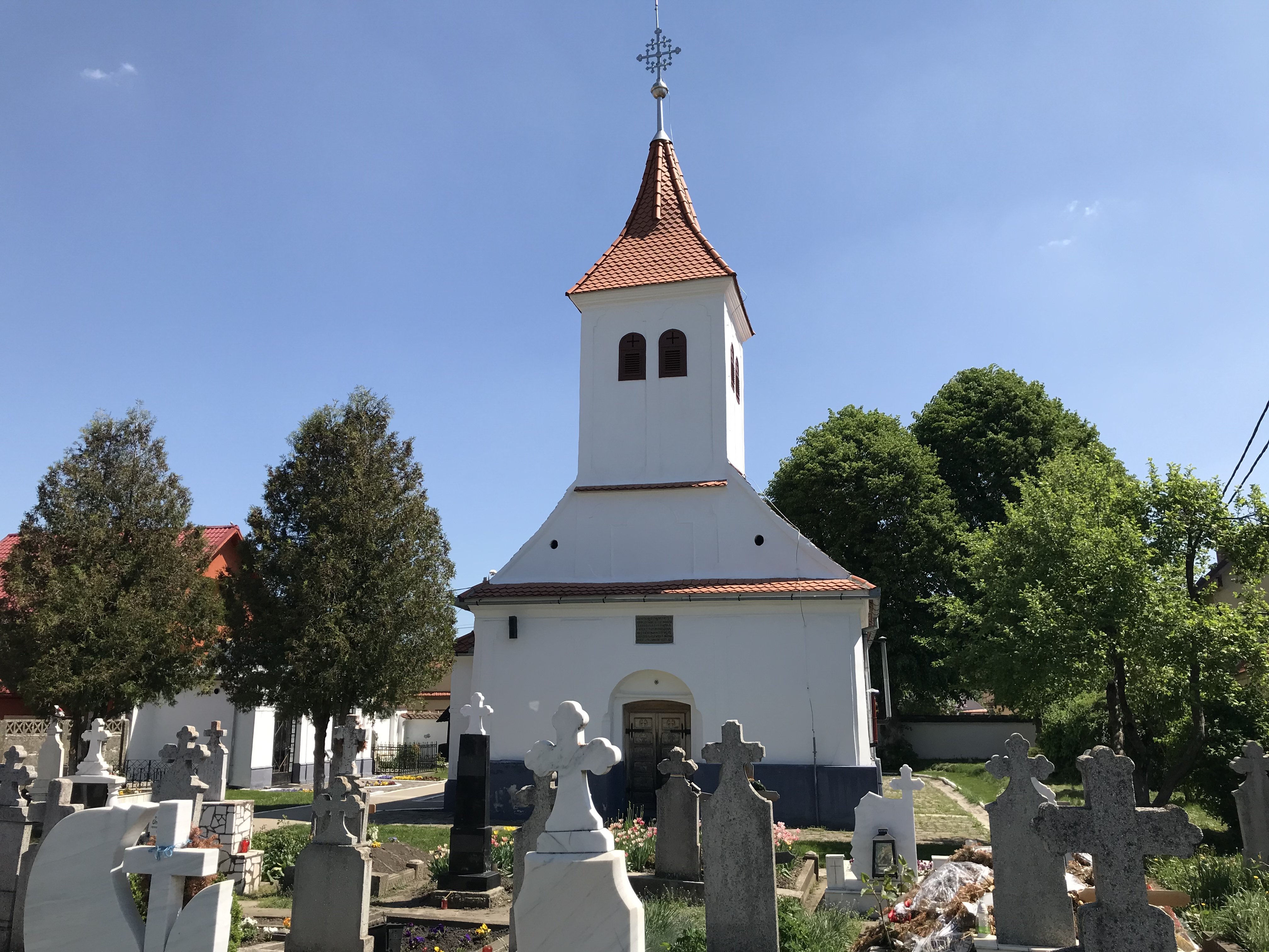 Biserica „Sf. Arhangheli”, sat Hălchiu, județul Brașov 01